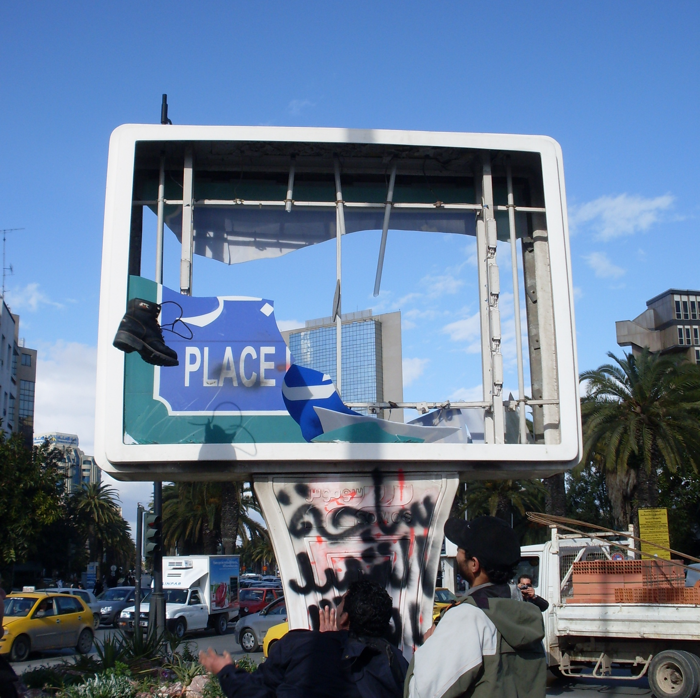 Jet de chaussure sur la plaque signalétique de la place du 7-Novembre à Tunis lors de la révolution tunisienne de 2011 avec en arrière plan le siège du RCD, l'ancien parti au pouvoir